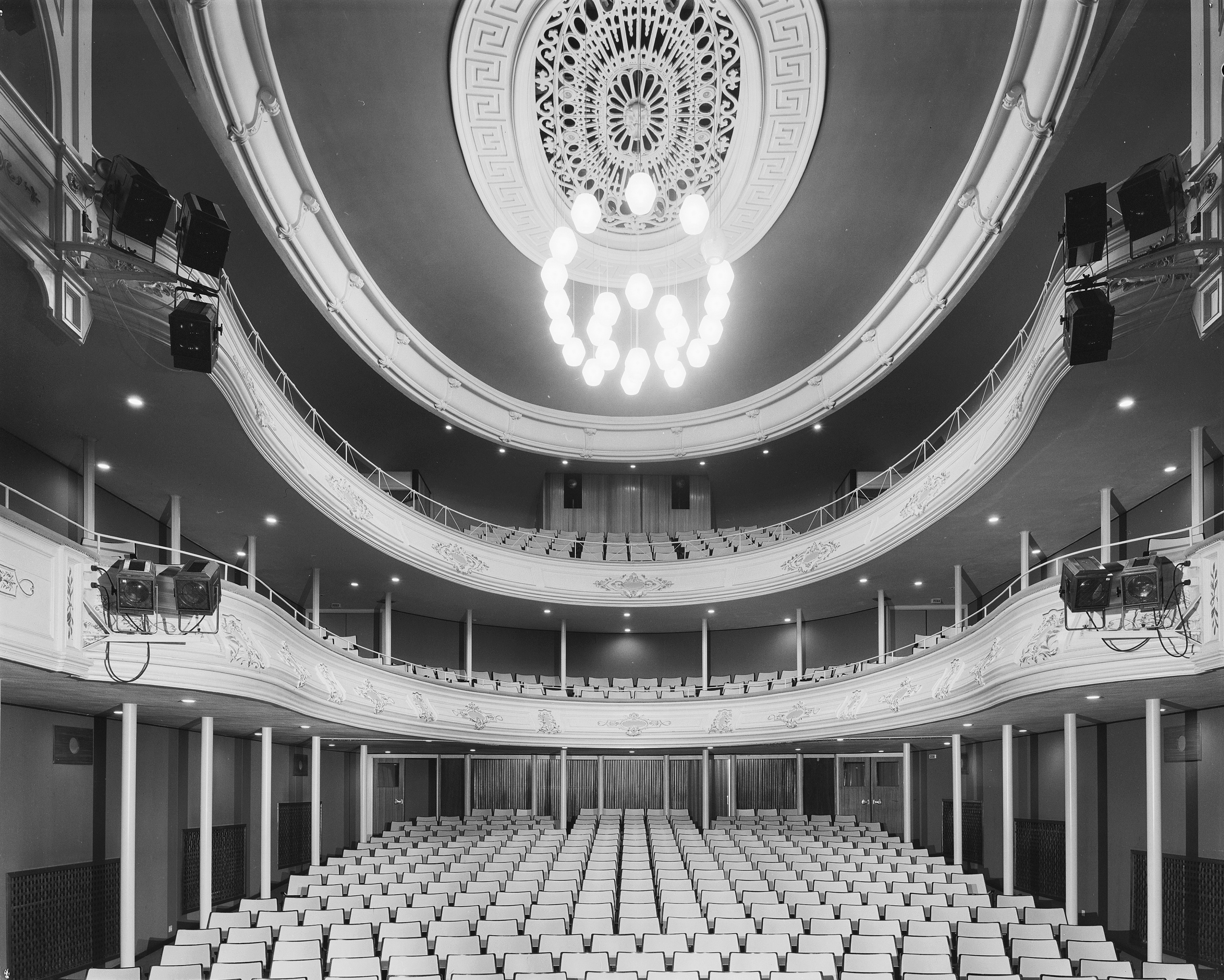 Stadsschouwburg: schouwburgzaal naar het toneel gezien